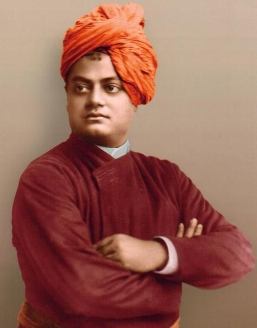 ಕನ್ನಡ: ವಿವೇಕಾನನಂದರ ಭವ್ಯ ನಿಲುವು